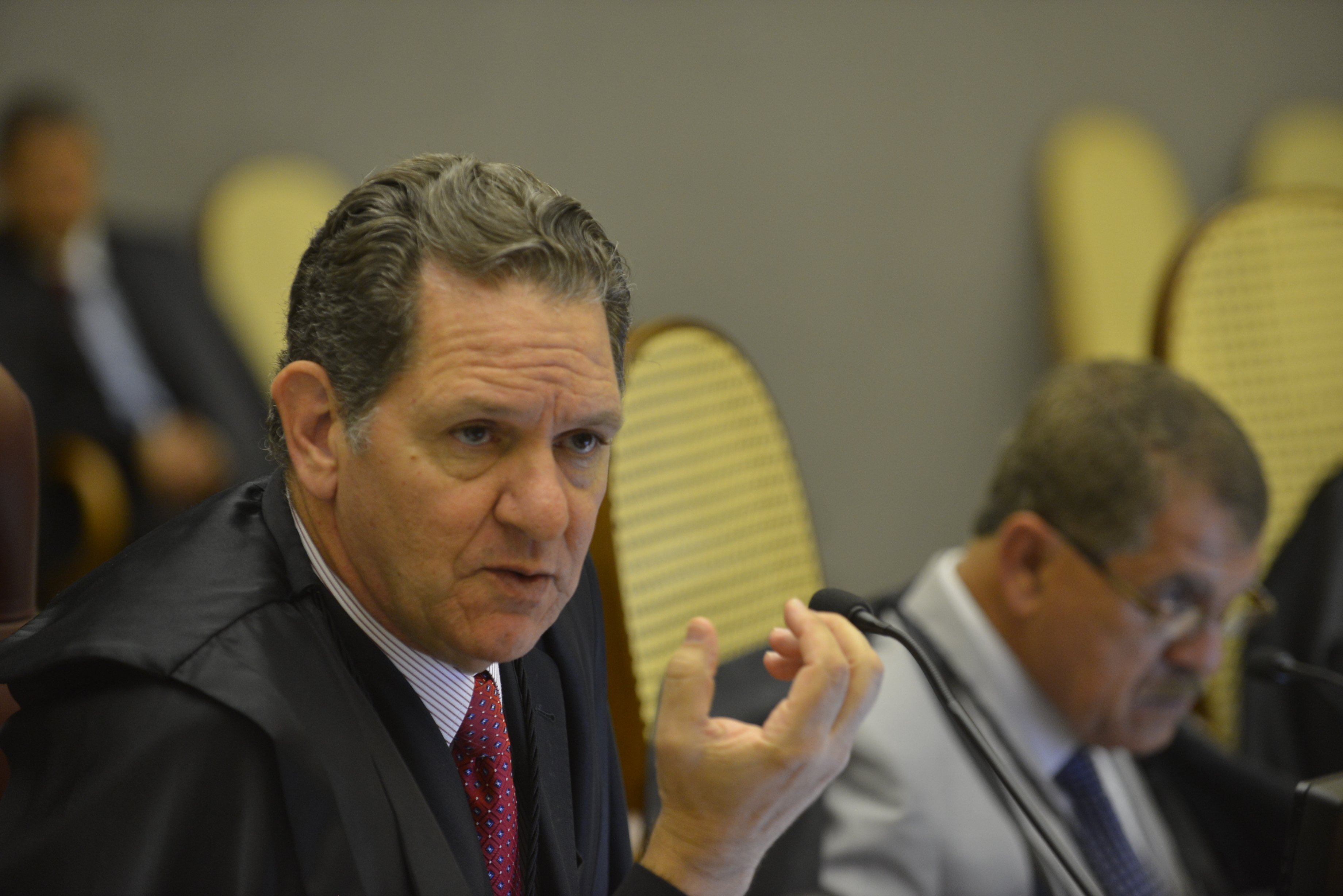 Ministro João Otávio de Noronha